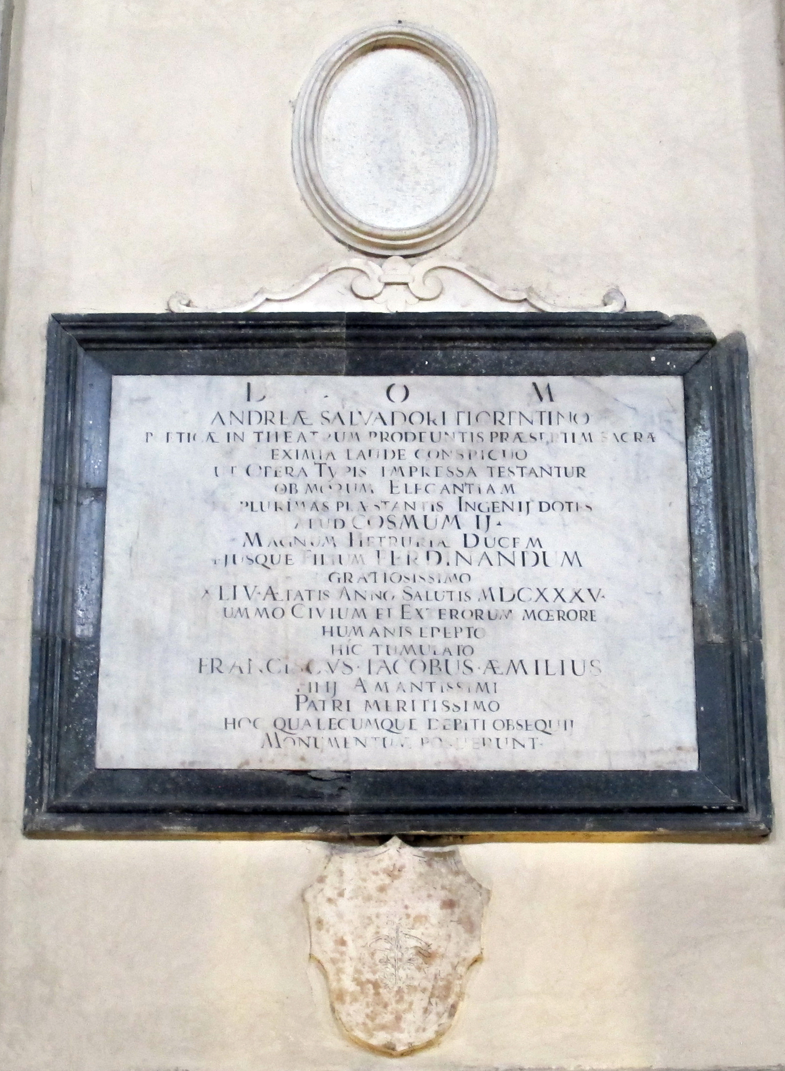 Santi Simone e Giuda (Firenze), epitaffio di Andrea Salvadori